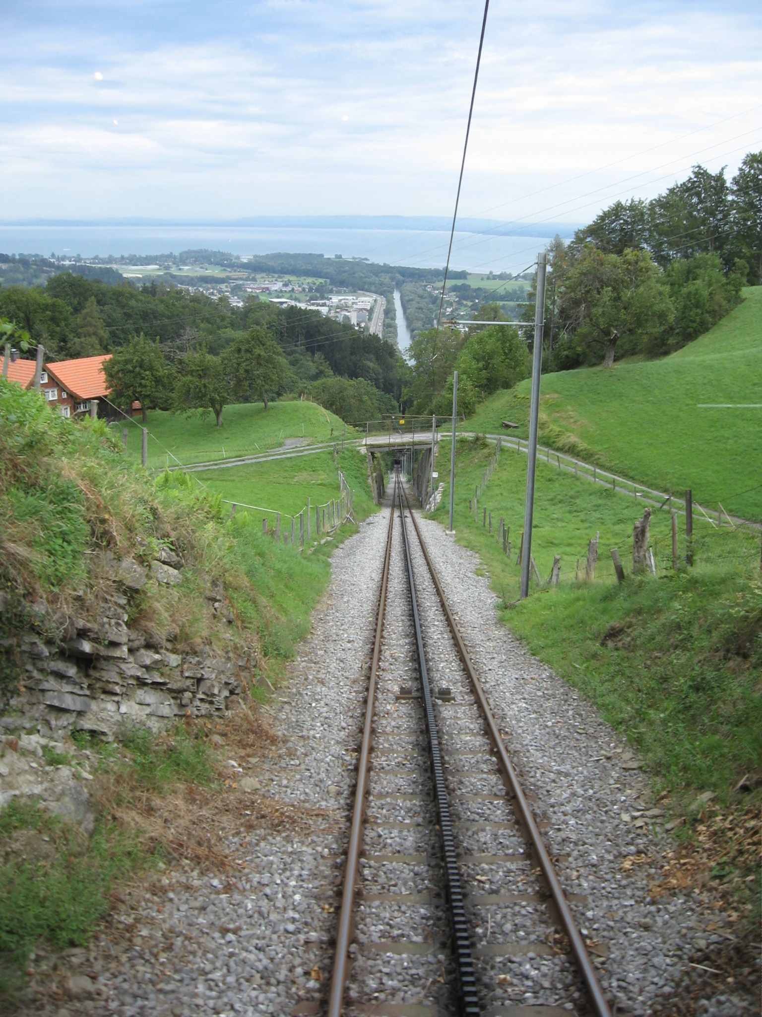 Gleise der Bergbahn Rheineck Walzenhausen. Im Bildhintergrund Rheineck.